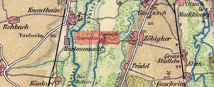 Summary Bildbeschreibung: Cospuden auf einer Karte um 1913 Quelle: K. Jacob: Atlas für die Heimatkunde von Leipzig., Alfred Hahns Verlag Leipzig, um 1913